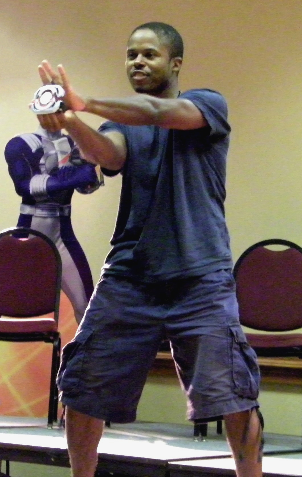 Walter Jones (Black Power Ranger) Morphs! @ PersaCon '09